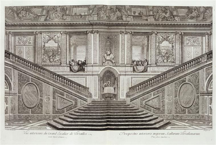 Le Grand Escalier du château de Versailles. planche 6 : "vue intérieure du Grand Escalier des Ambassadeurs, côté opposé à l'entrée" du graveur français Louis de Surugue de Surgis (1686-1762).